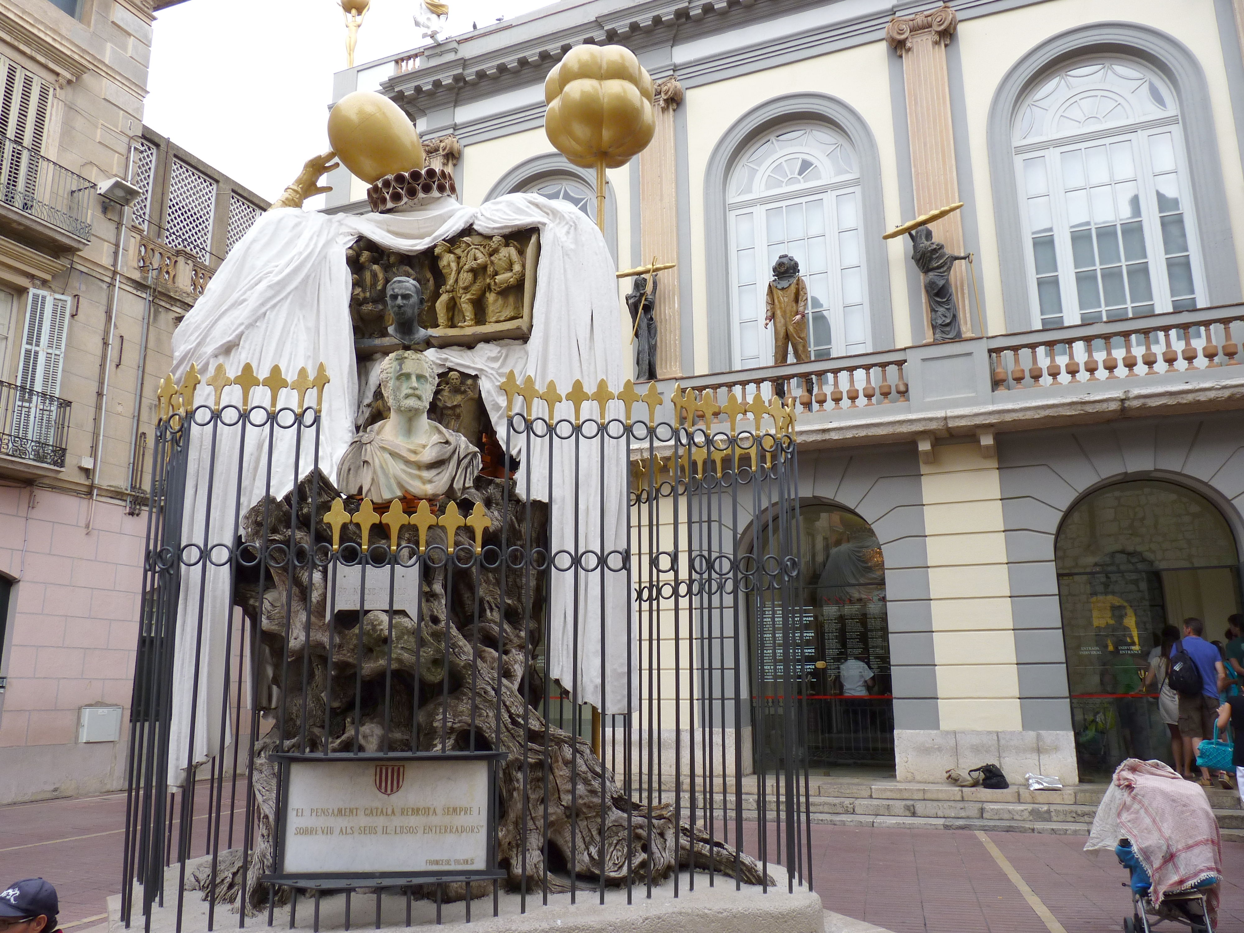 Monument dédié par Dalí à l'écrivain Francesc Pujols i Morgades, Figuères (Haut-Ampurdan, Gérone, Catalogne, Espagne)